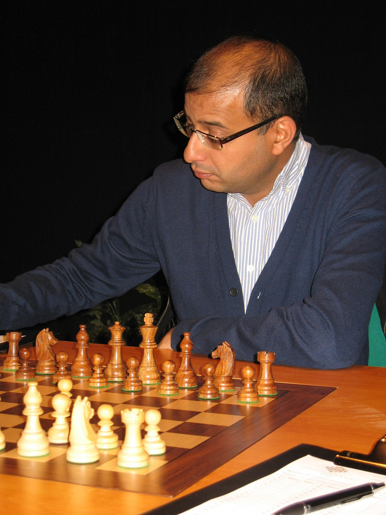 GM Hamdouchi (Gros de San Sebastian)